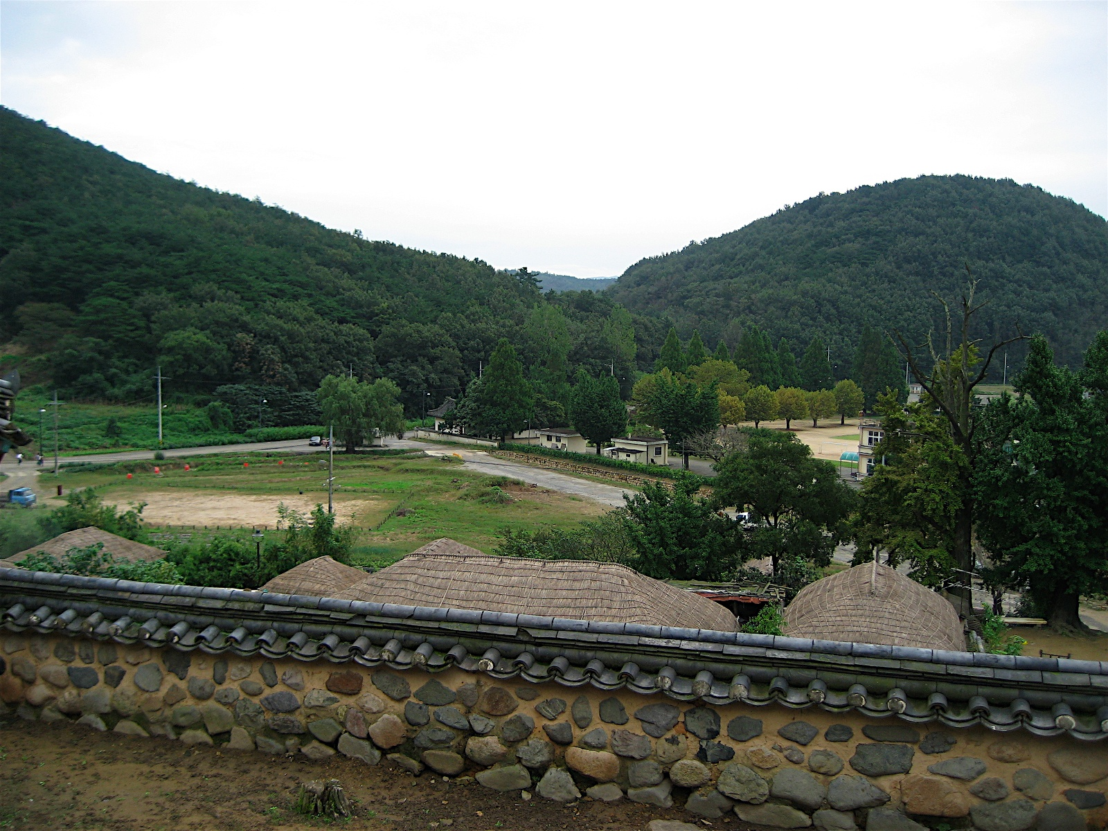 Yangdong Folk Village in Gyeongju, Gyeongsangbuk-do, South Korea